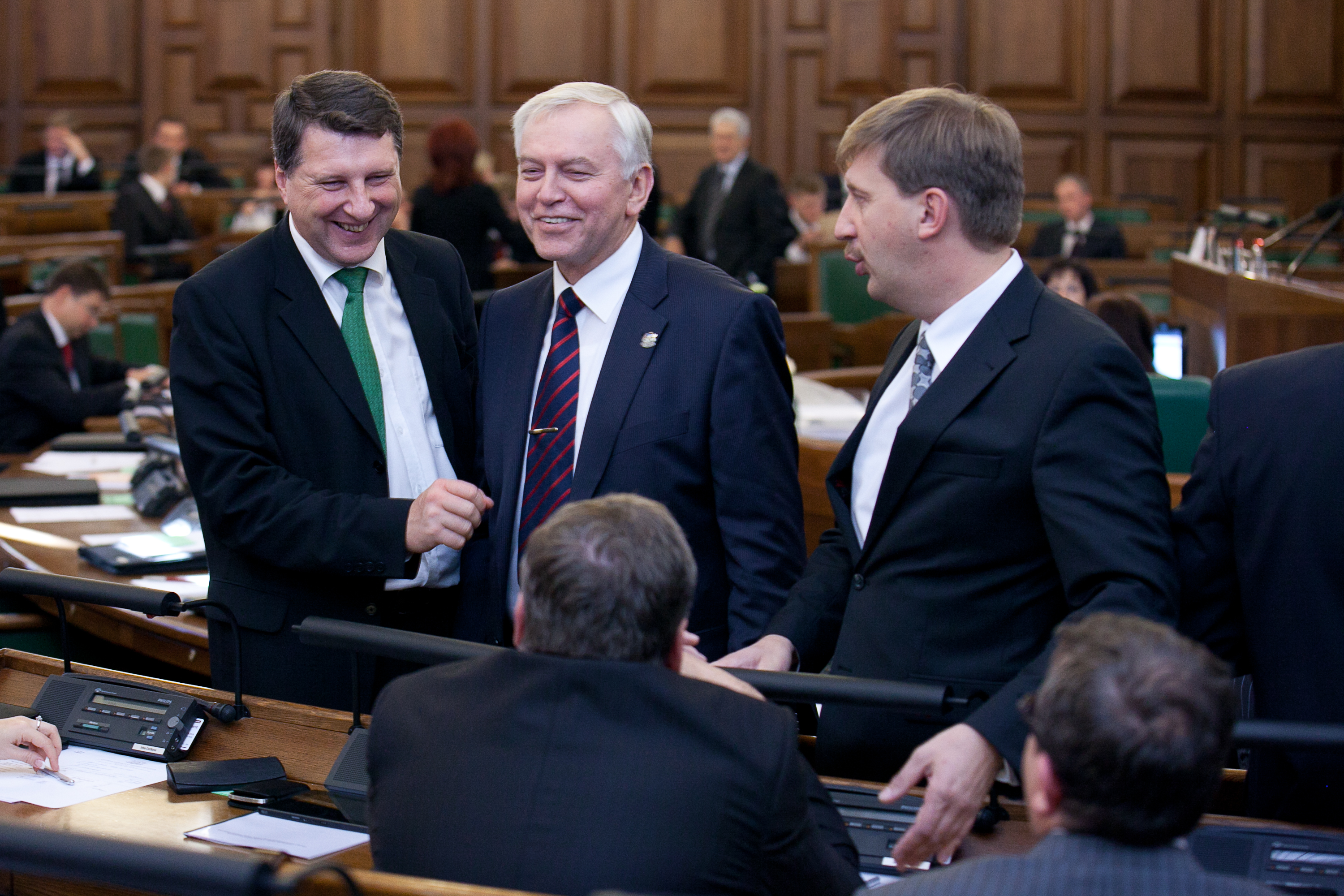 2011.gada 17.oktobris. 11.Saeimas Prezidija locekļu vēlēšanas. Foto: Ernests Dinka, Saeimas Kanceleja